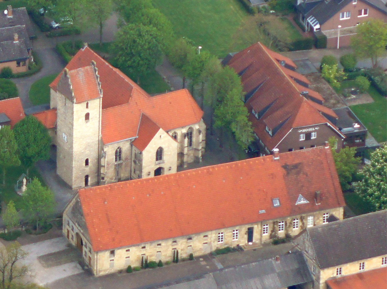 Luftbild der Kirche St. Bonifatius in Nottuln-Schapdetten